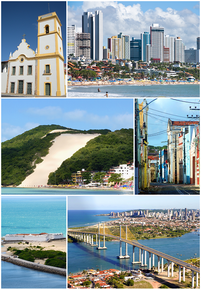 Montagem de fotos da cidade de Natal, Brasil. Do topo, da esquerda para a direita: Igreja Matriz de Nossa Senhora da Apresentação, no centro histórico; visão da Praia de Ponta Negra e do bairro homônimo; Morro do Careca; Rua Chile; Fortaleza dos Reis Magos e visão aérea da Ponte Newton Navarro e do Rio Potenji.